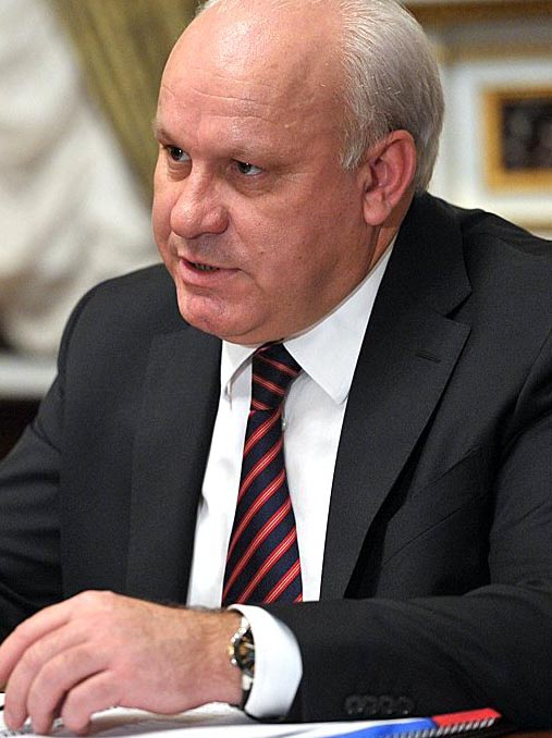 Временно исполняющий обязанности Главы Республики Хакасия Виктор Зимин